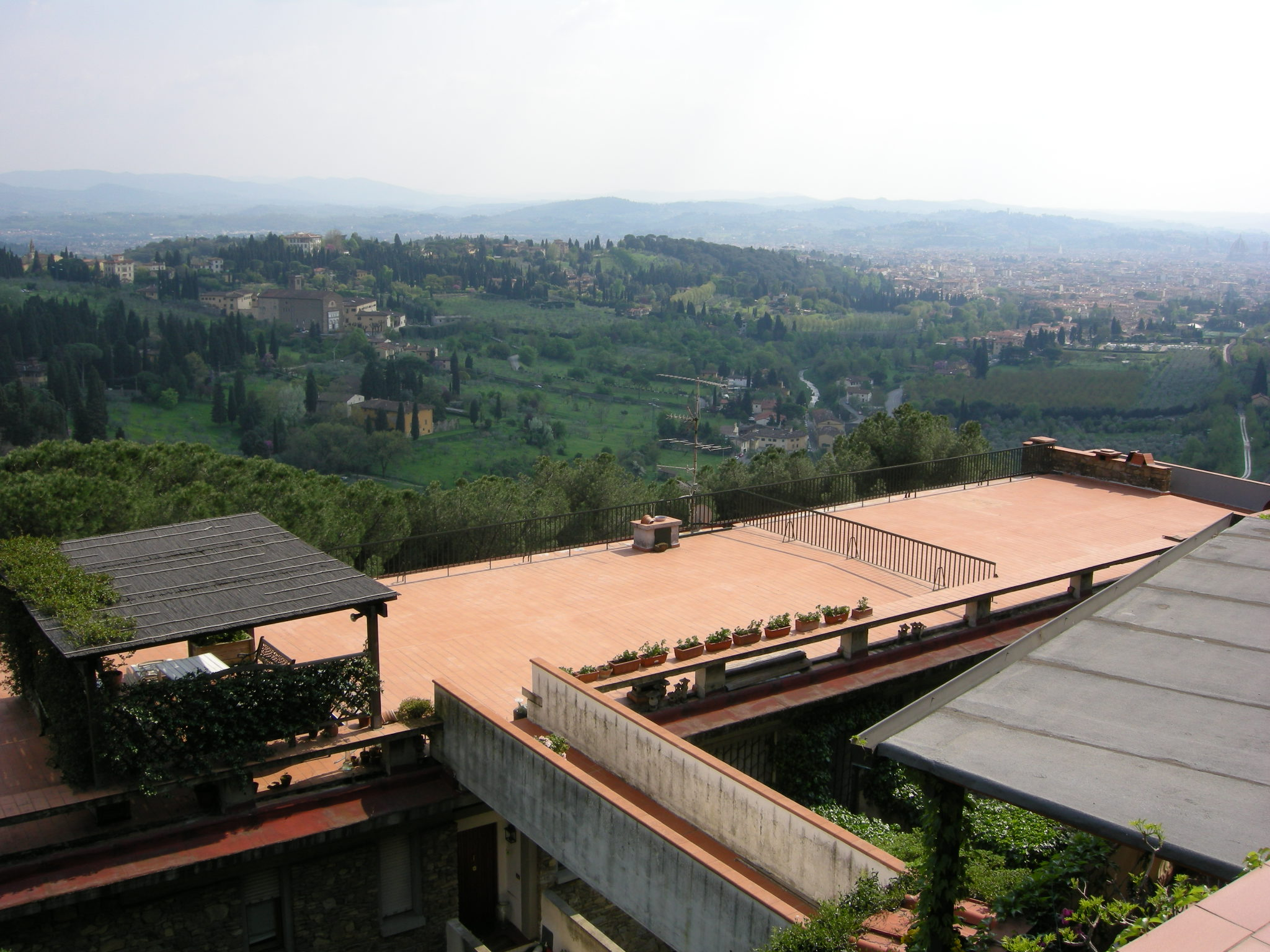 Complesso di monterinaldi